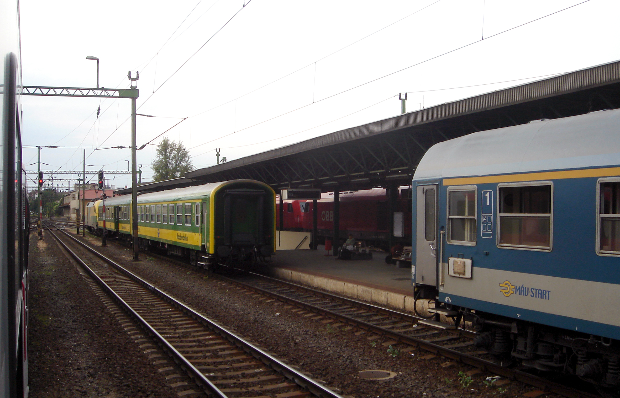 Bahnhof Sopron, aufgenommen aus einem als Mattersburger Bahn eingelaufenen und als Burgenlandbahn weiterfahrenden Zug.